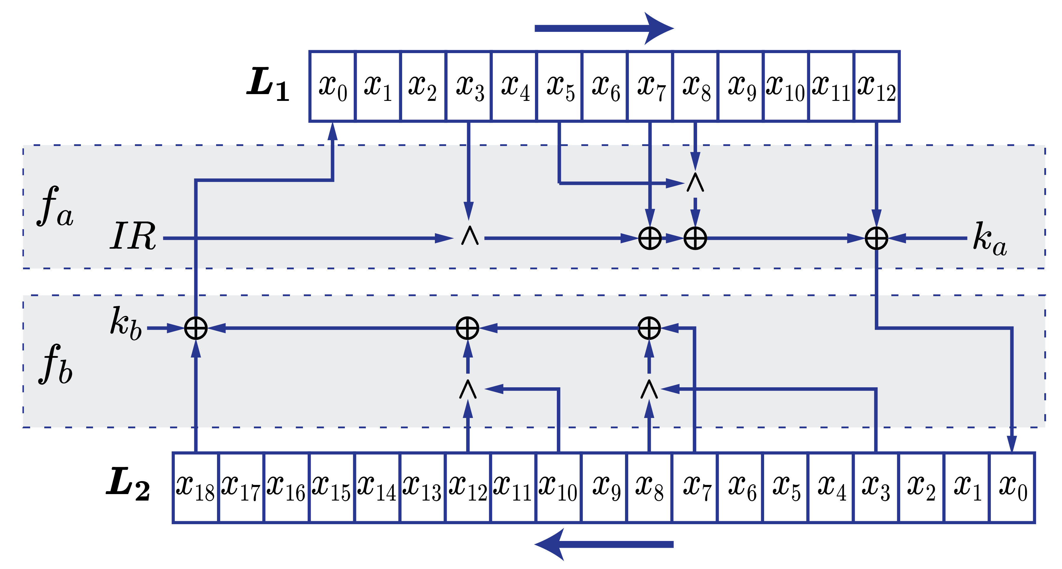 תיאור סכמתי של צופן KATAN32